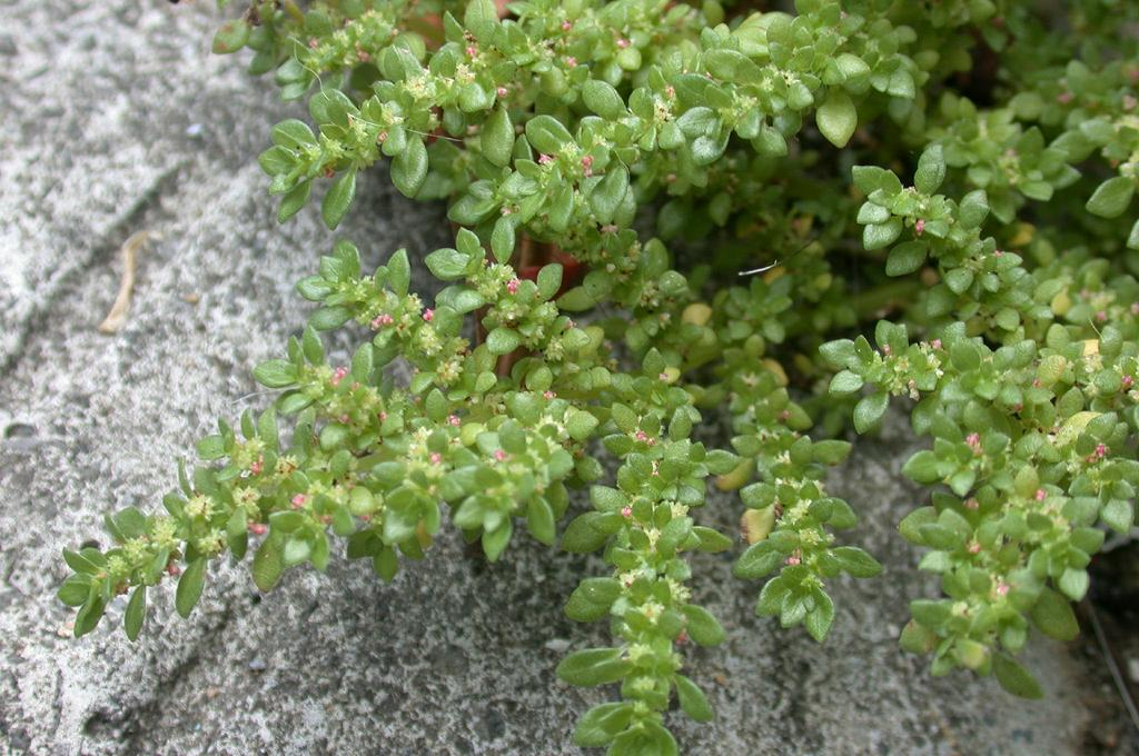 Pilea microphylla：コゴメミズ 2002/08/19 沖縄本島：Okinawa Island, Japan